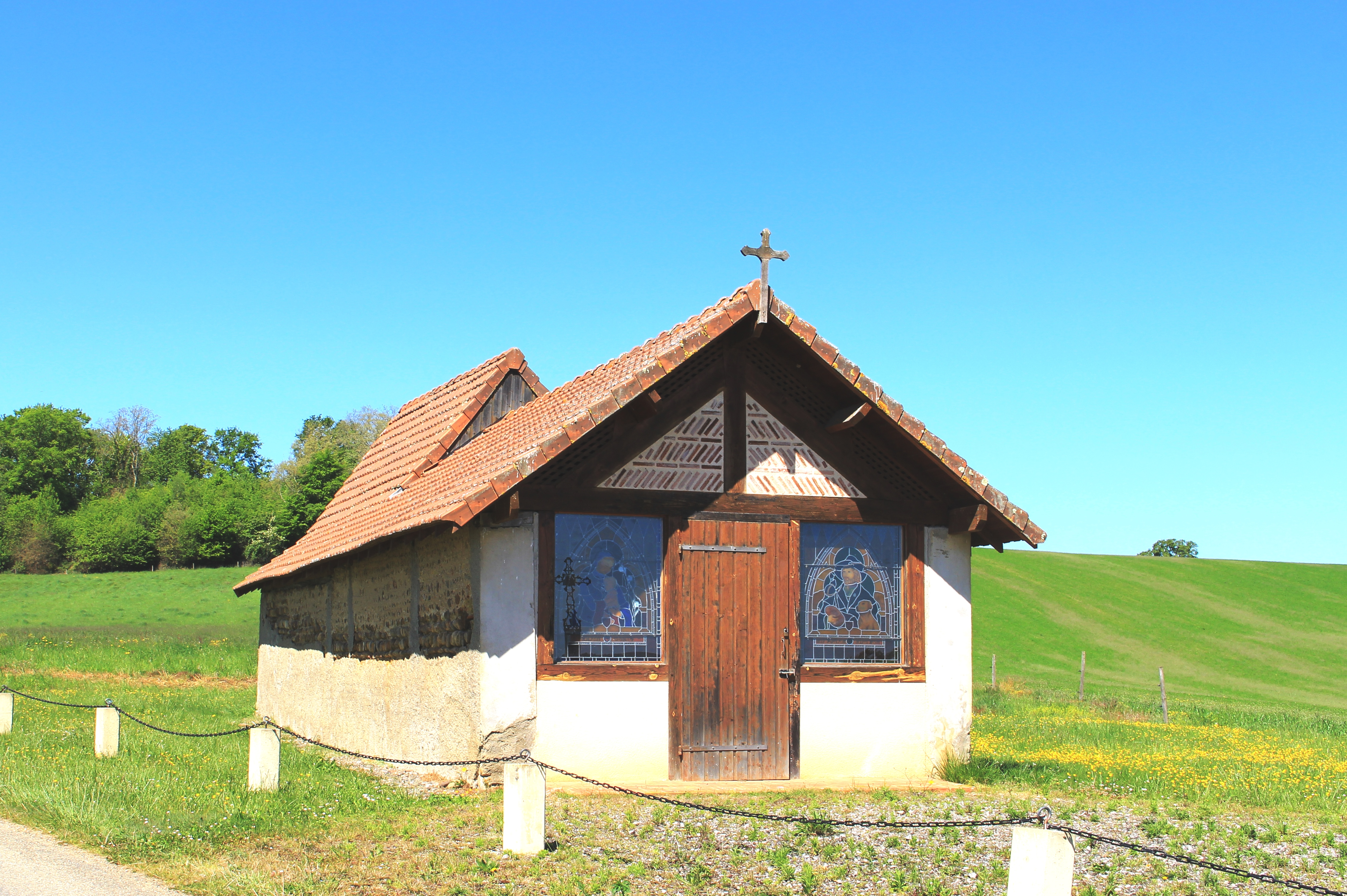 Chapelle Saint Roch de Fontrailles (Hautes-Pyrénées)